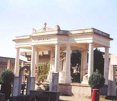 tomba del tenore Giovan Battista Rubini nel cimitero di Romano di Lombardia